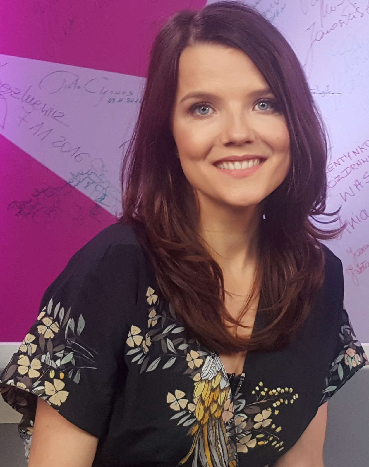 Polska aktorka i radca prawny Joanna Jabłczyńska na nagraniu programu "Gwiazdy Cejrowskiego" w listopadzie 2017 roku.